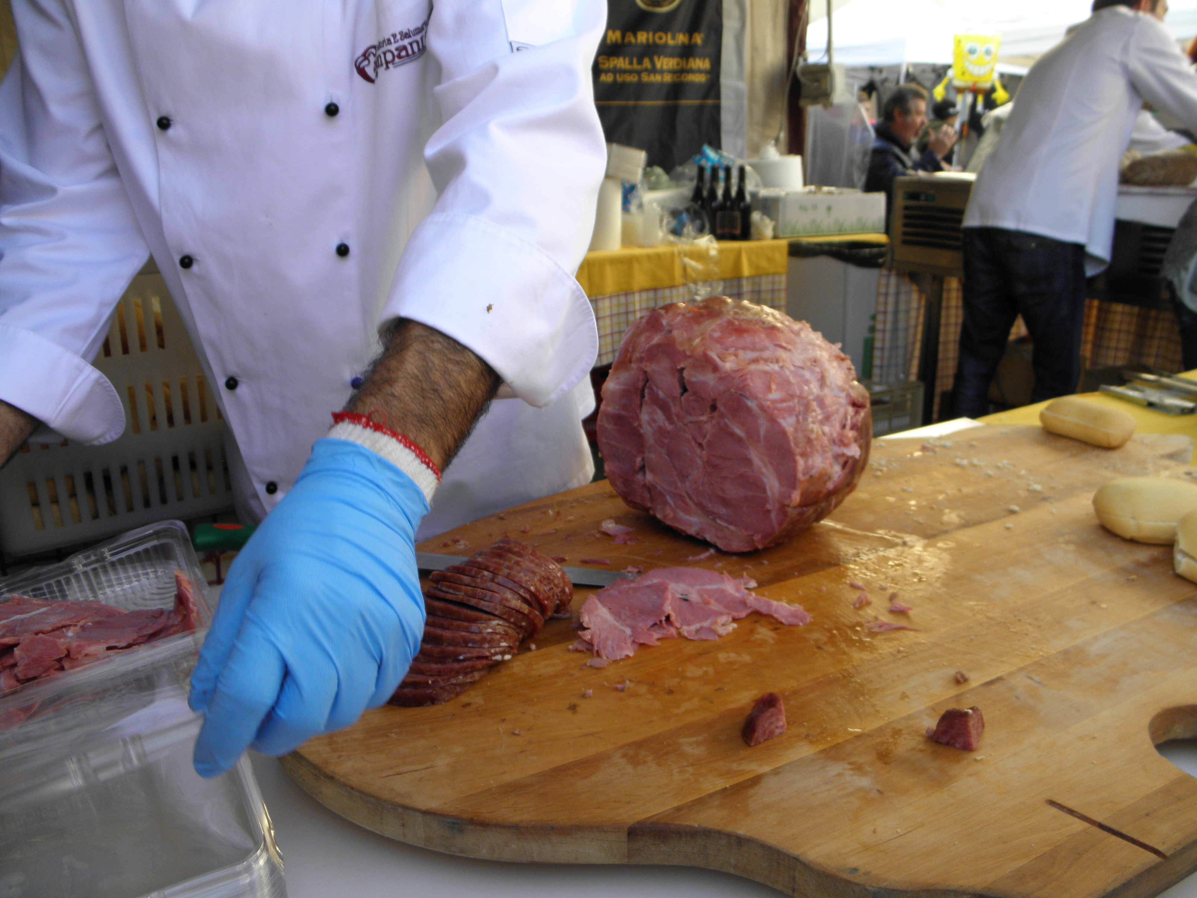 Sissa, già comune autonomo, frazione di Sissa Trecasali: November Porc edizione 2015, taglio della spalla cotta calda per preparazione panini.